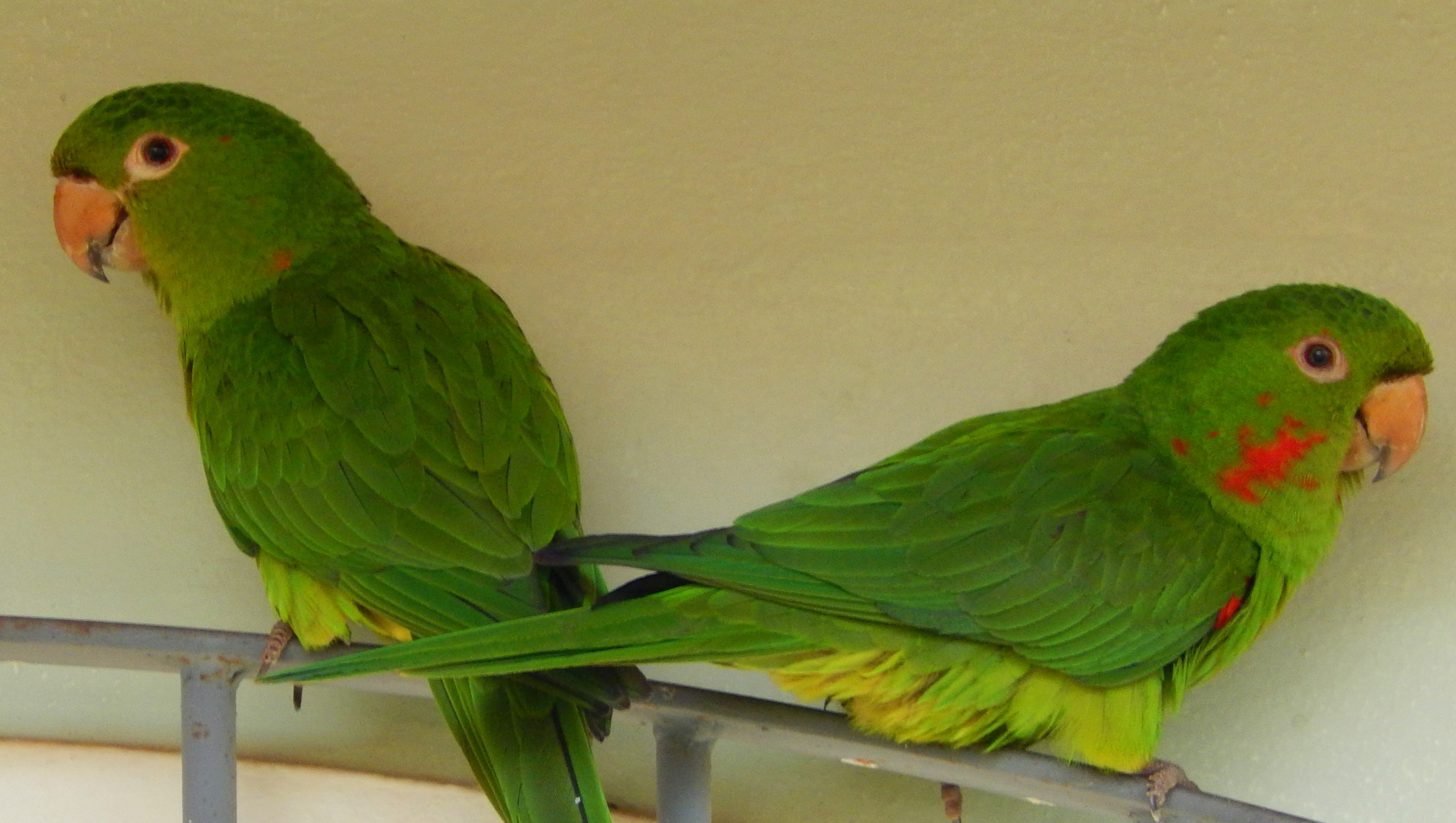 Português do Brasil: Aratinga leucophthalma. Itajubá-MG, Brasil.(1)